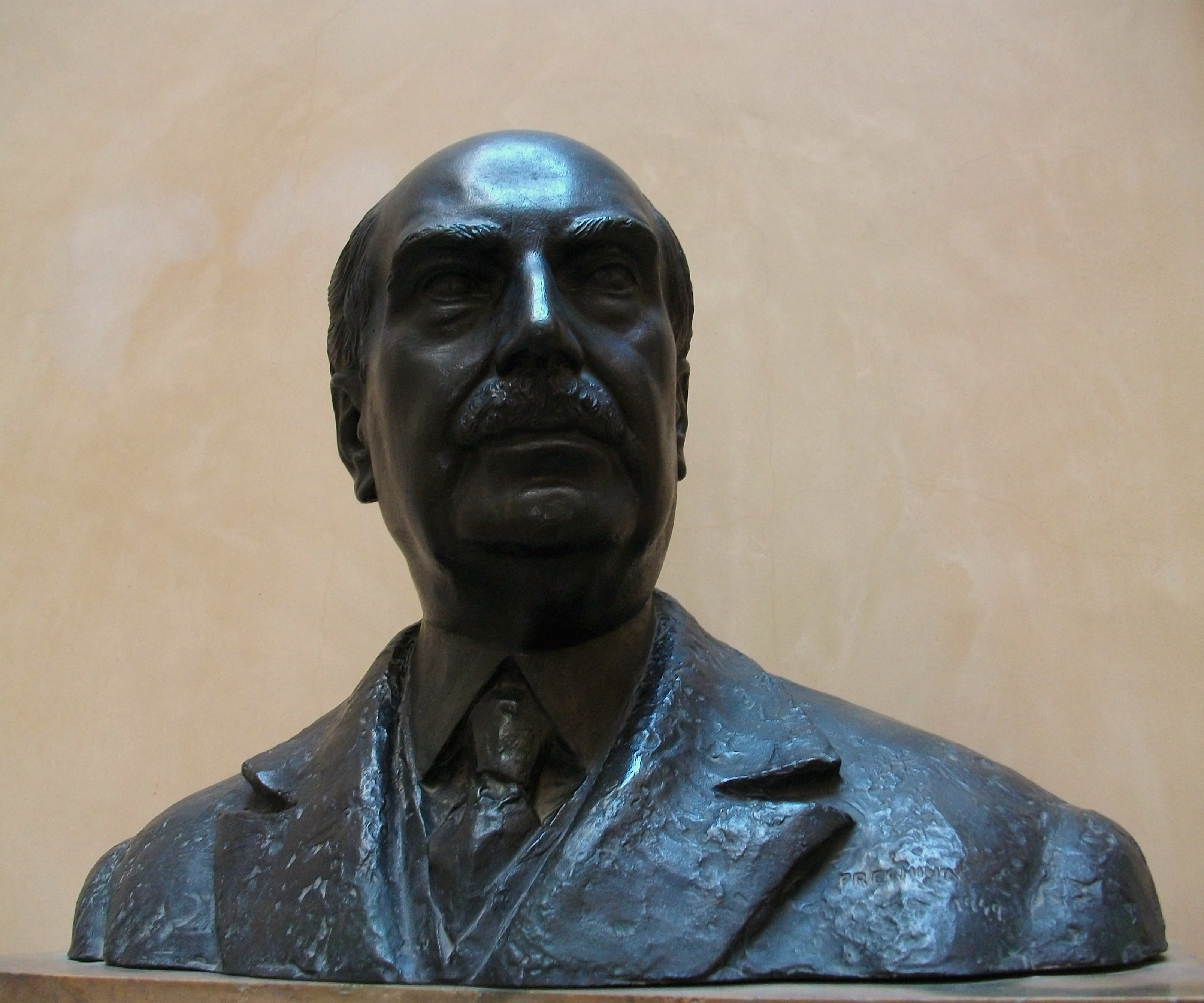 Bust de Manuel González Martí, al museu de cerèmica que porta el seu nom.